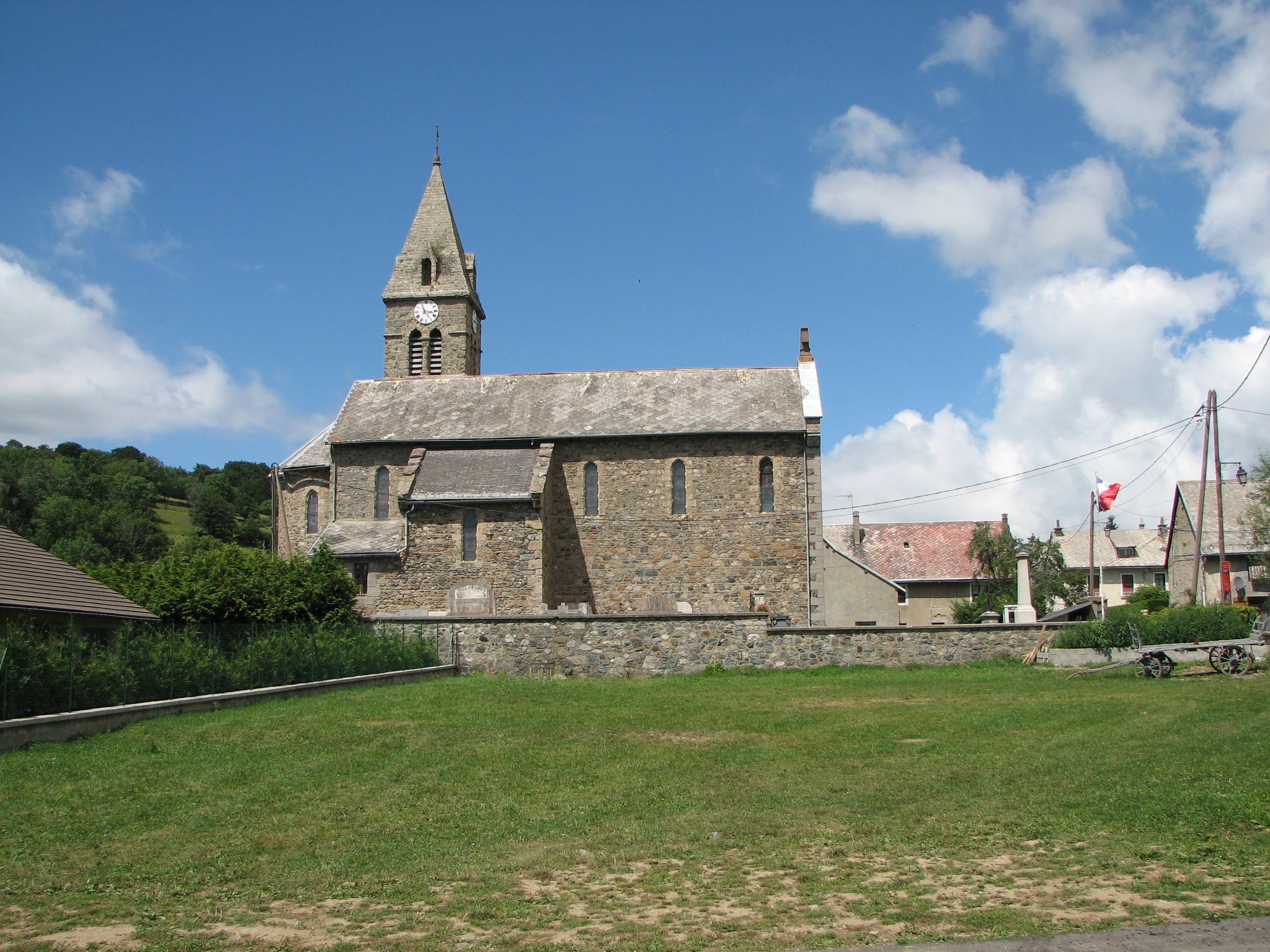 Eglise de Cholonge (Isère) Church of Cholonge, village of Isère (France)